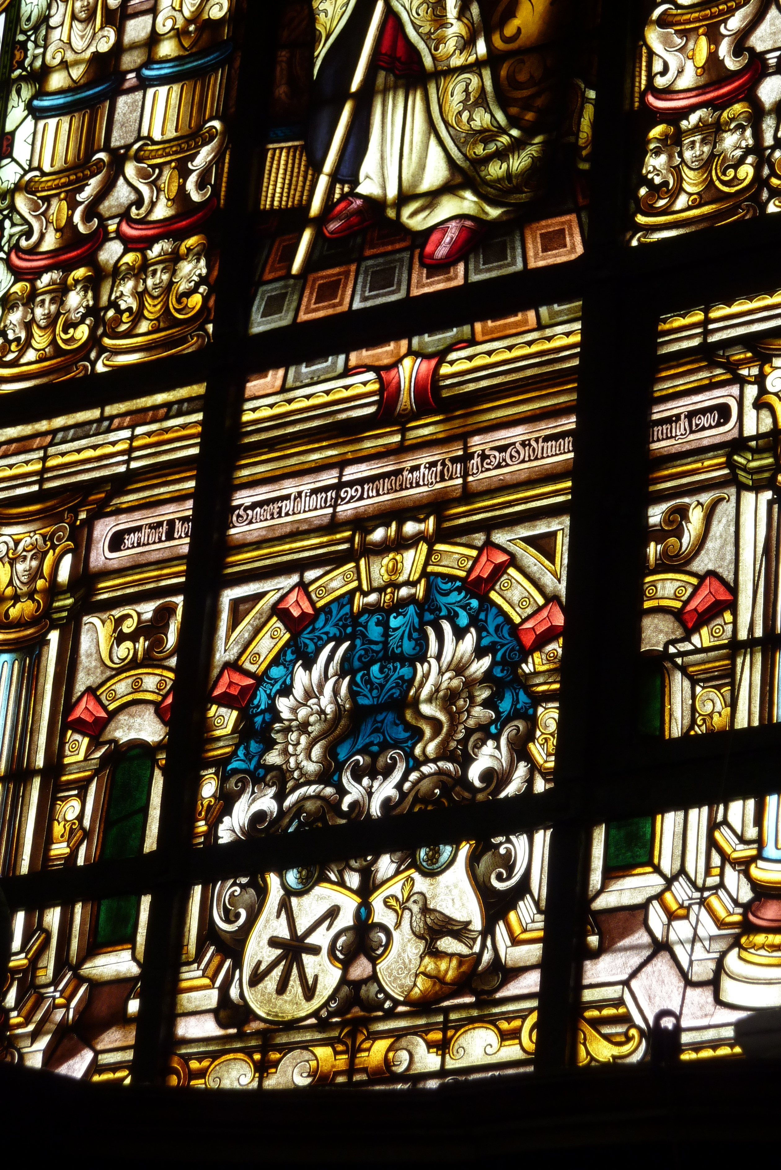 Bleiglasfenster in der katholischen Pfarrkirche St. Nikolaus in Eupen (Belgien), Darstellung: Ausschnitt mit Signatur: Oidtmann